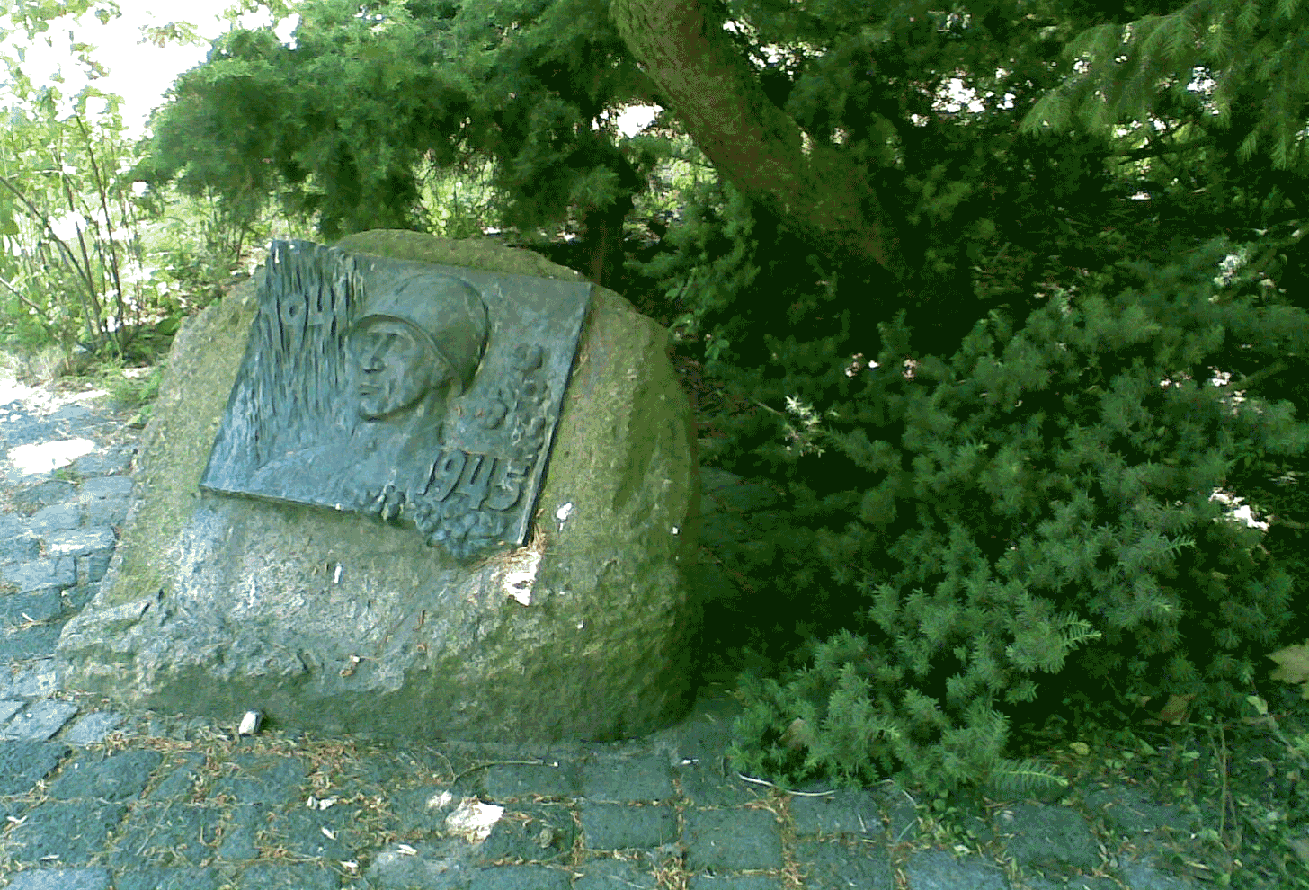 Gedenkplatte zum 40. Jahrestag des Kriegsendes mit lokalem Bezug